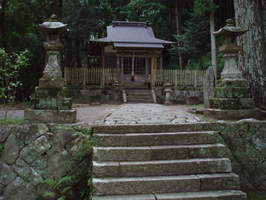 Takijiri-oji_shrine_1